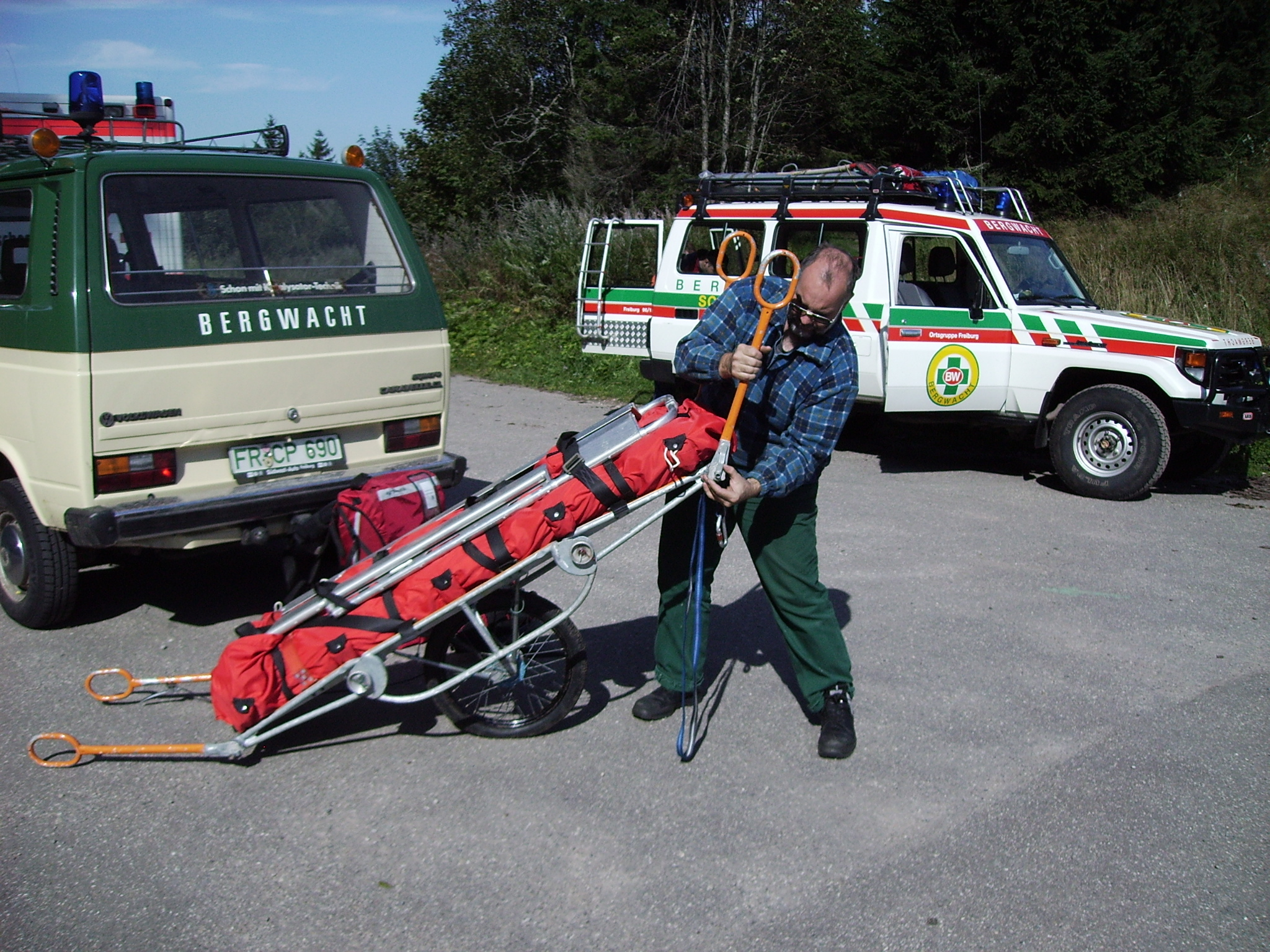 Gebirgstrage (mit Radsatz, Vakuummatratze in Bergesack, Schaufeltrage), im Hintergrund Einsatzfahrzeuge der Bergwacht Schwarzwald Mountain Rescue stretcher (with wheel, vacuum mattress, scoop stretcher), in the background vehicles of German Black Forest Mountain Rescue